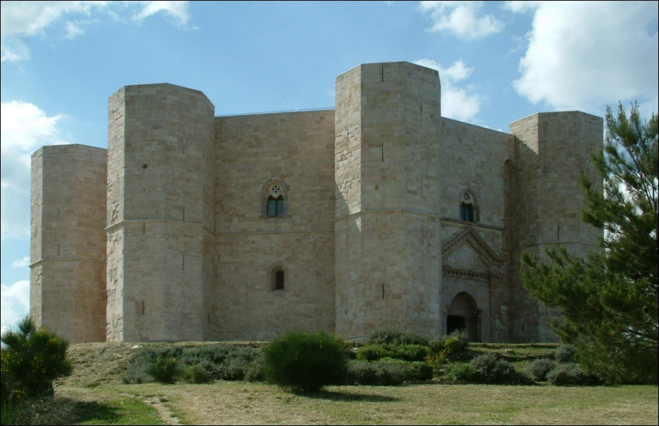 Castel del Monte, Puglia, Italy